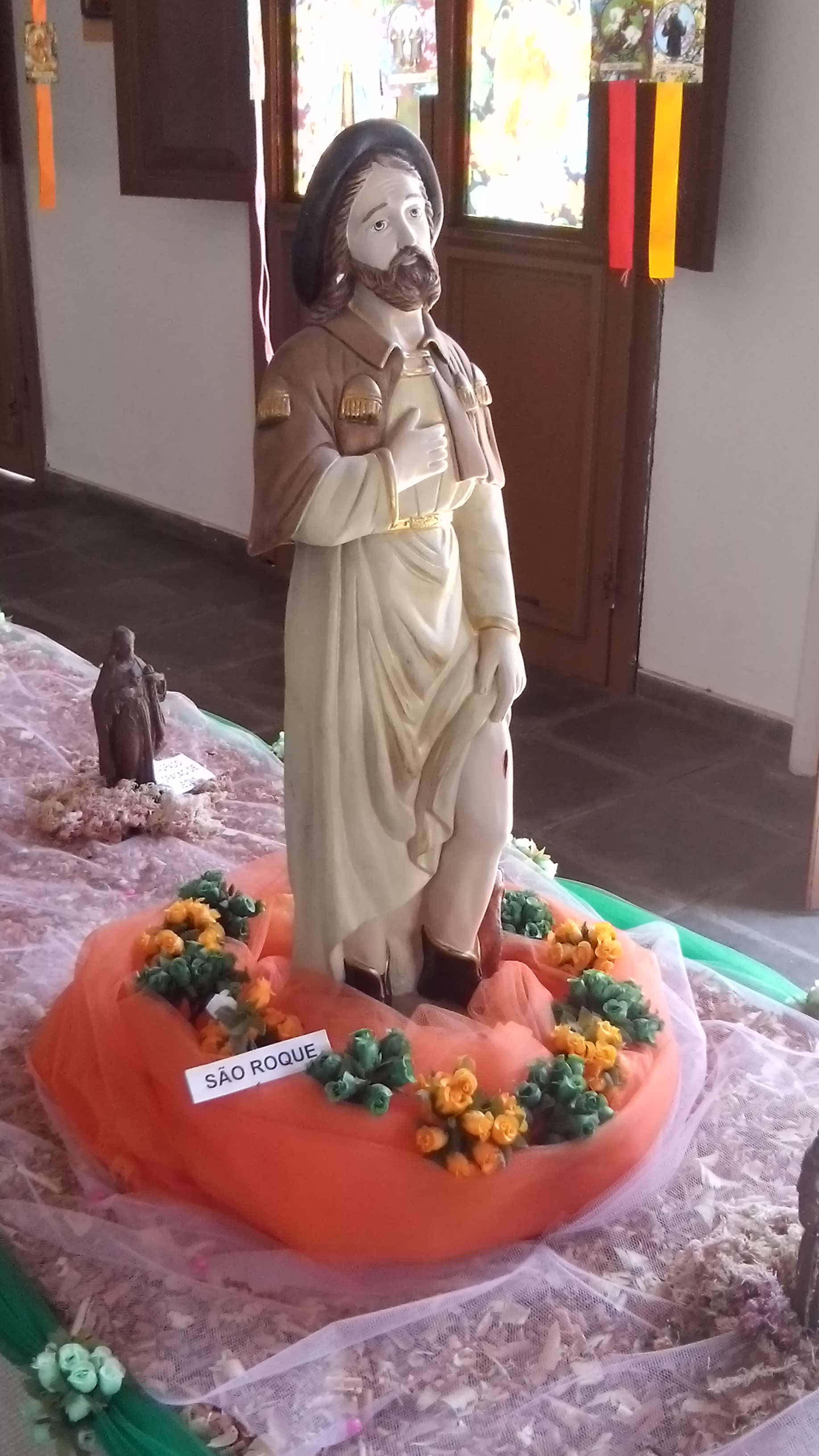 Foto do Santo São Roque